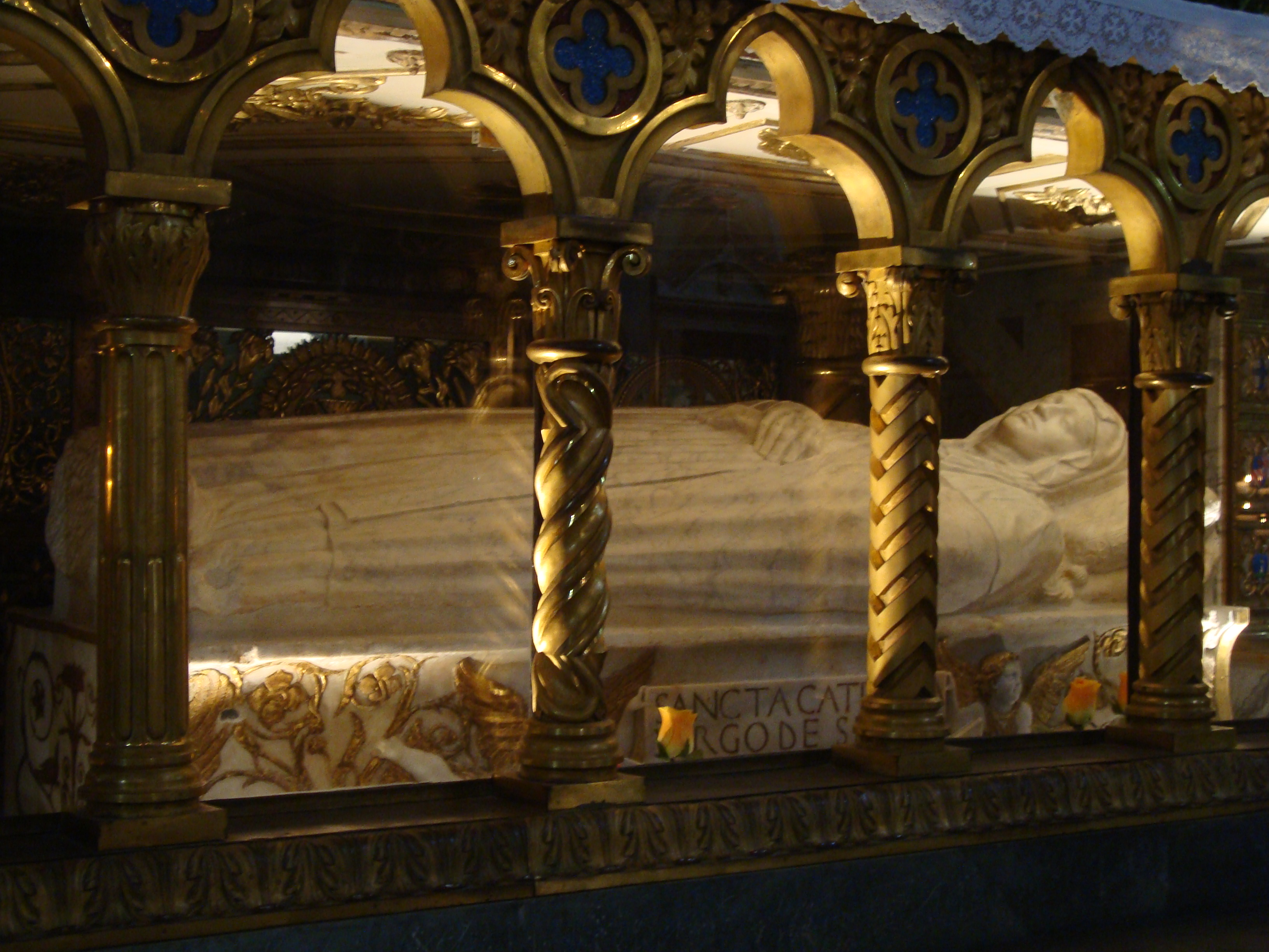 Sm. sopra minerva, santa caterina da siena